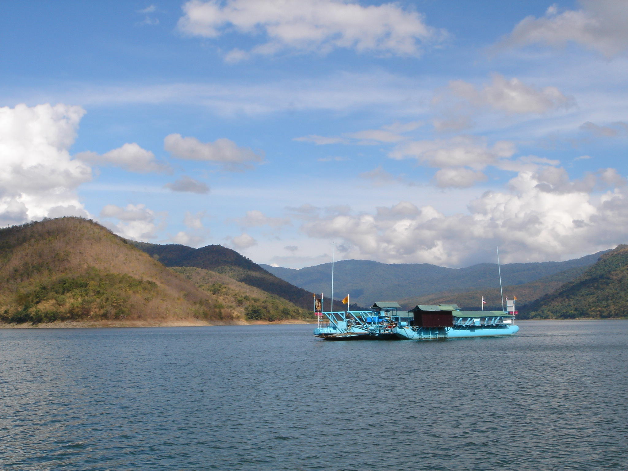 เรือข้ามฟากเขื่อนศรีนครินทร์